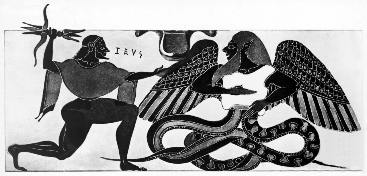 Combat de Zeus contre Typhon.